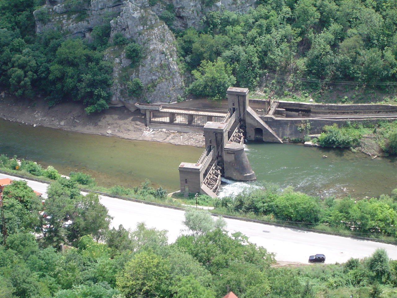 Хидроелектрана Сићево